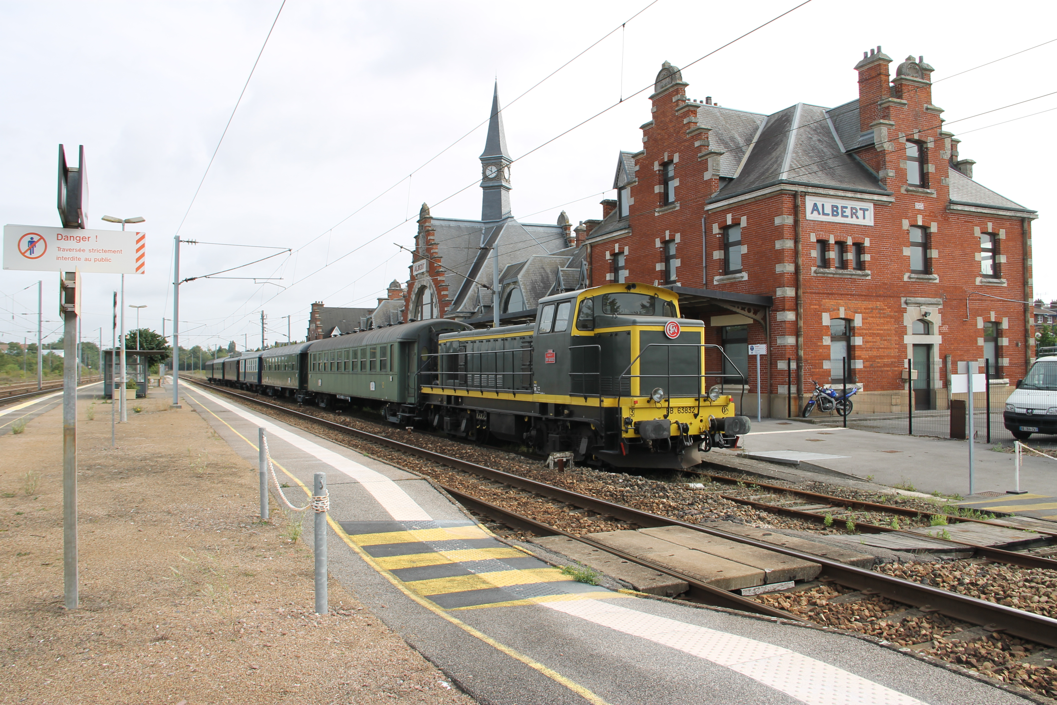 Gare d'Albert, département de la Somme, France, avec train spécial du Pacific Vapeur Club, en septembre 2013.